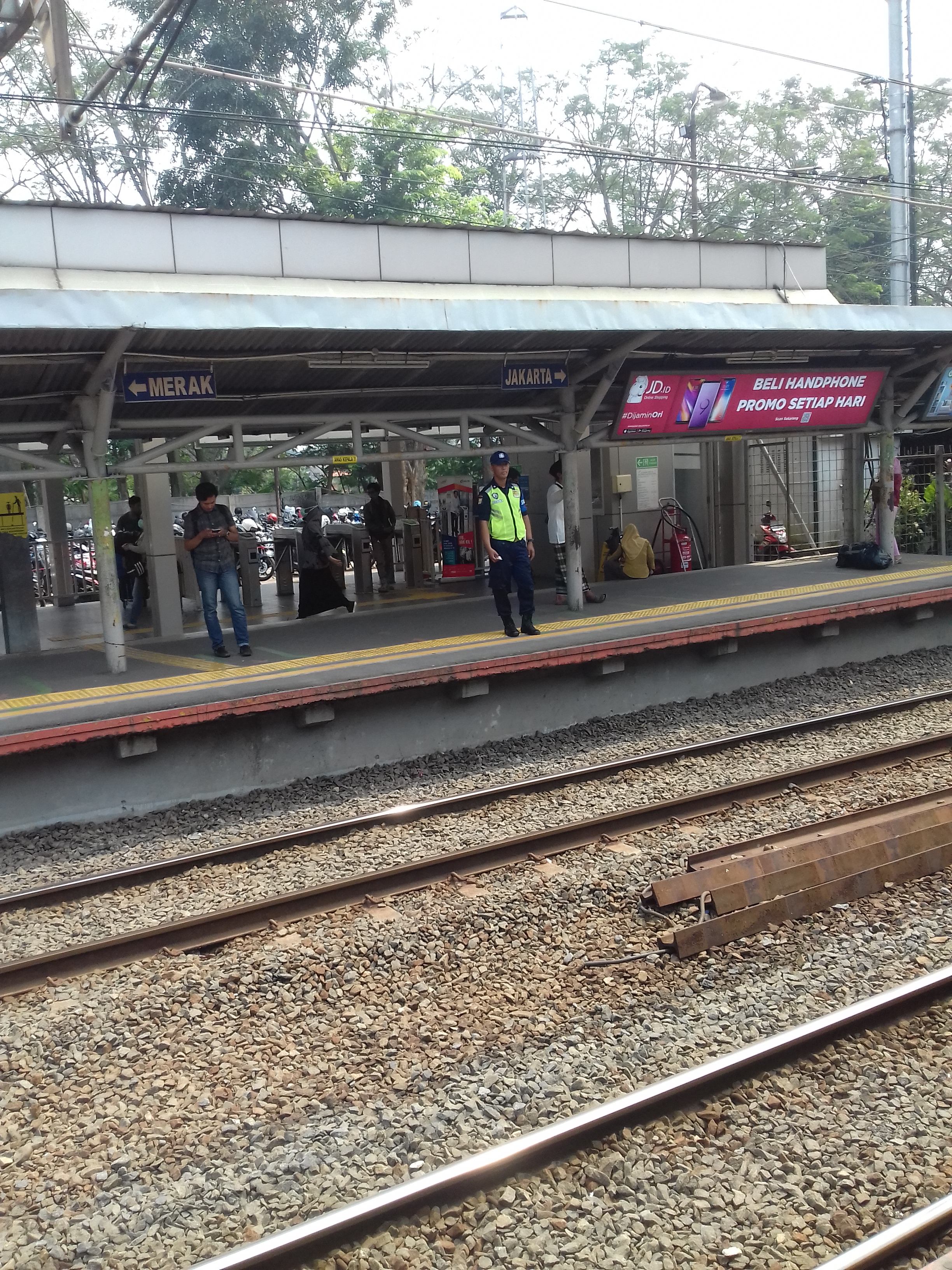 Peron Stasiun Pondok Ranji